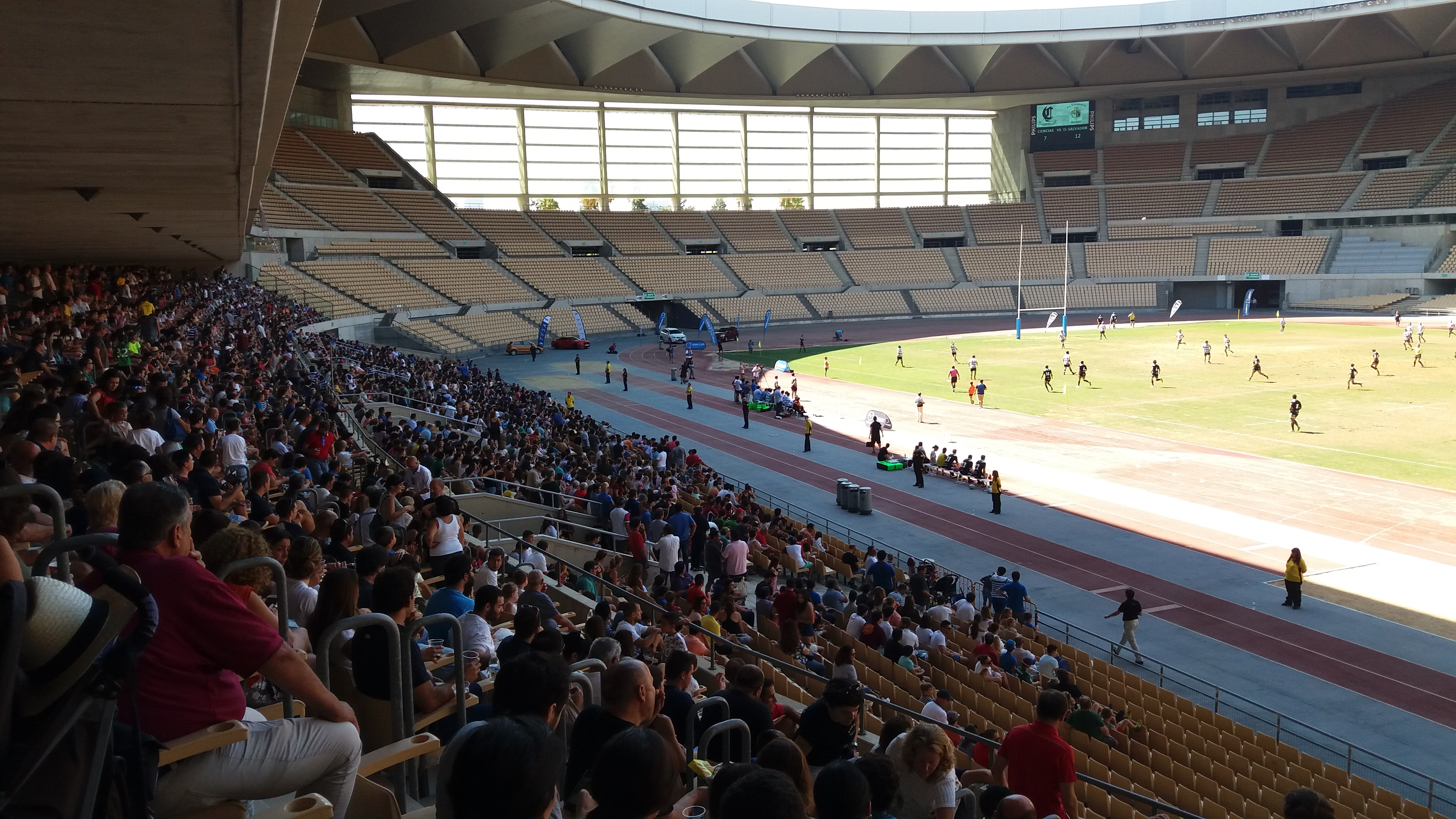 Fotografía del primer partido de División de Honor en su temporada 2016-2017. Se enfrentaban el Ciencias Fundación Cajasol contra el Silverstorm - El Salvador en el Estadio Olímpico de la Cartuja de Sevilla.